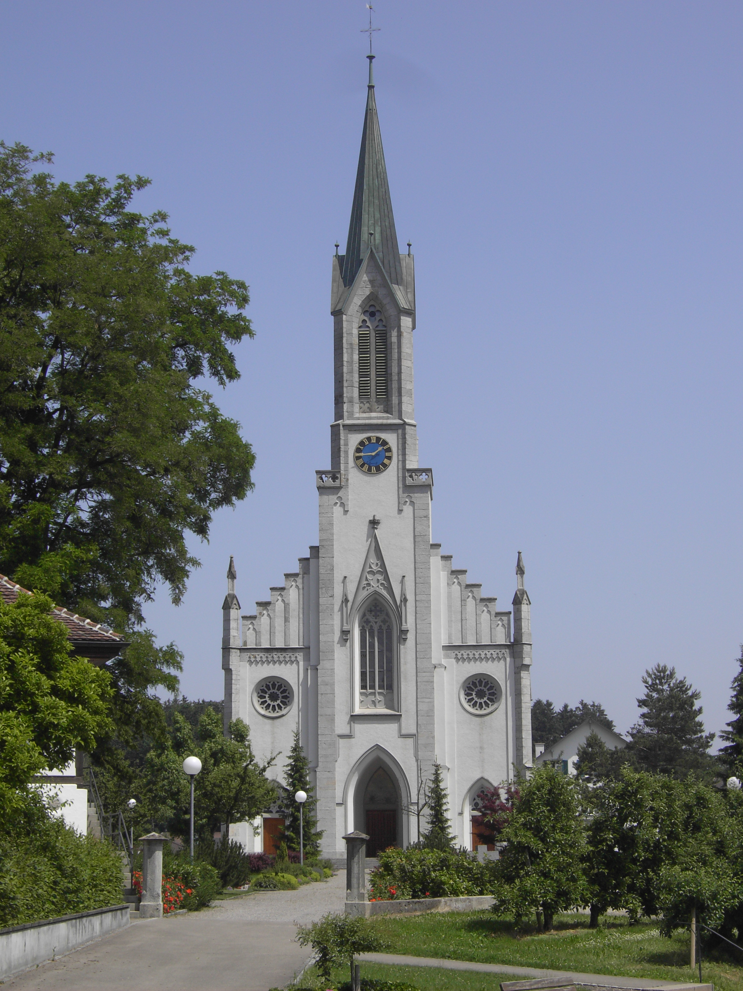 Rom.-catholic Church Bünzen AB, Switzerland